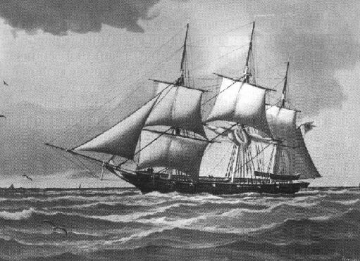 SMS Amazone I